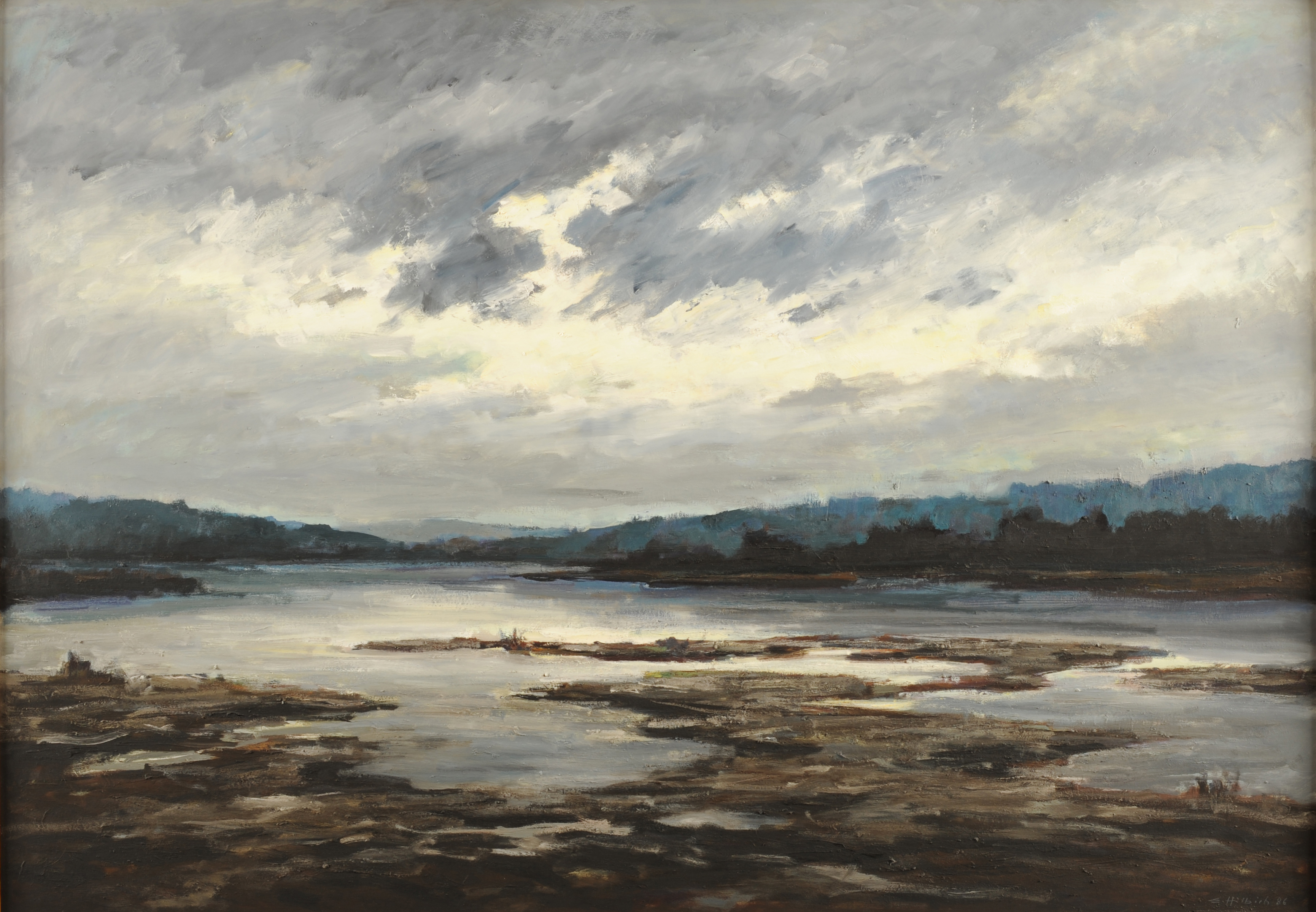 Engelbert Hilbich (1923-2011), Maler. Er setzte die Stimmungen der Landschaften, die er bei seinen ausgedehnten Spaziergängen erlebte, in seinen Bildern um.